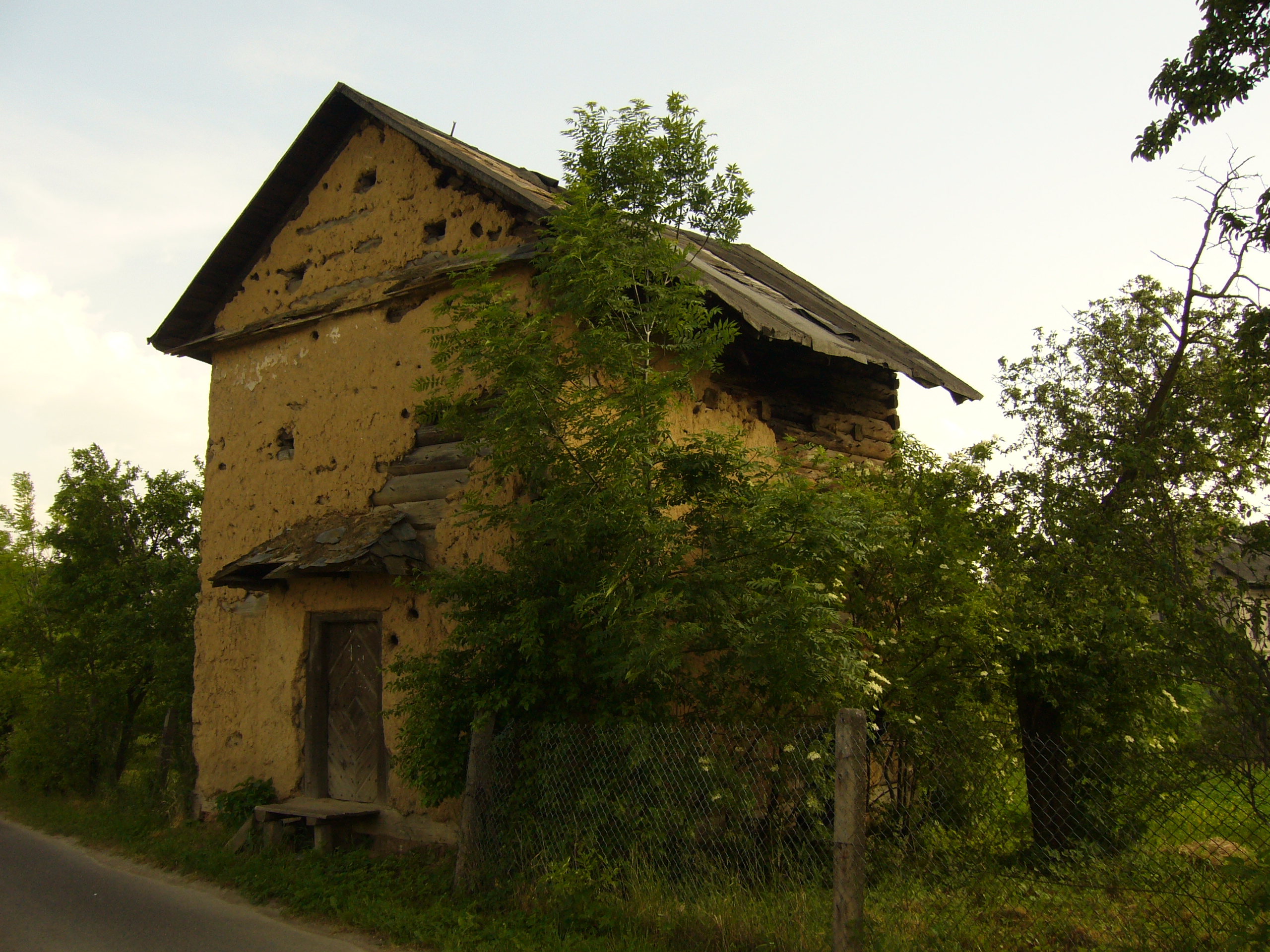 Zabytkowy spichlerz drewniany piętrowy, data powstania nieznana, obecnie nieużytkowany, wieś Rozumice, Województwo opolskie